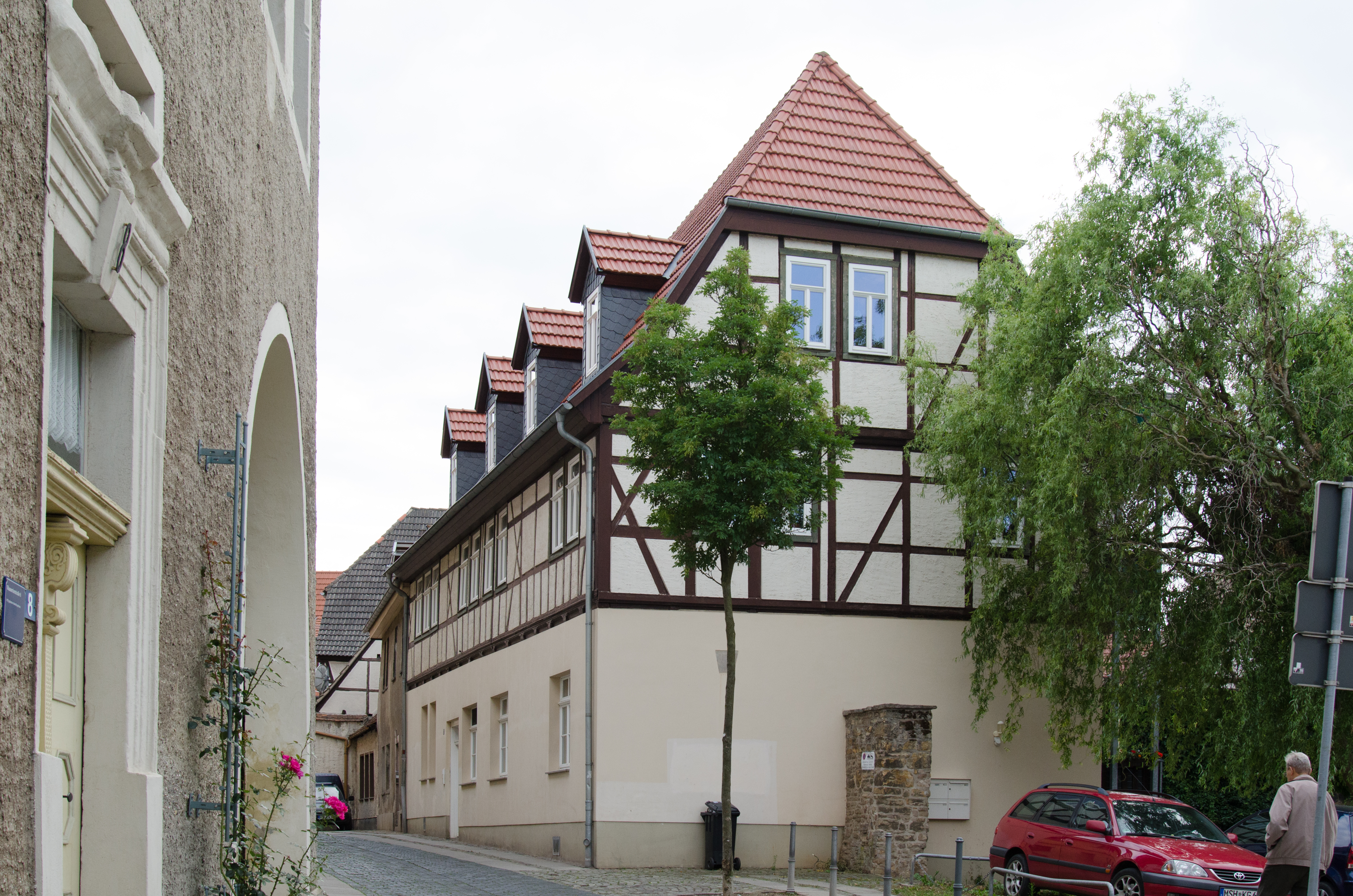 Sangerhausen, Wassertorstraße 3